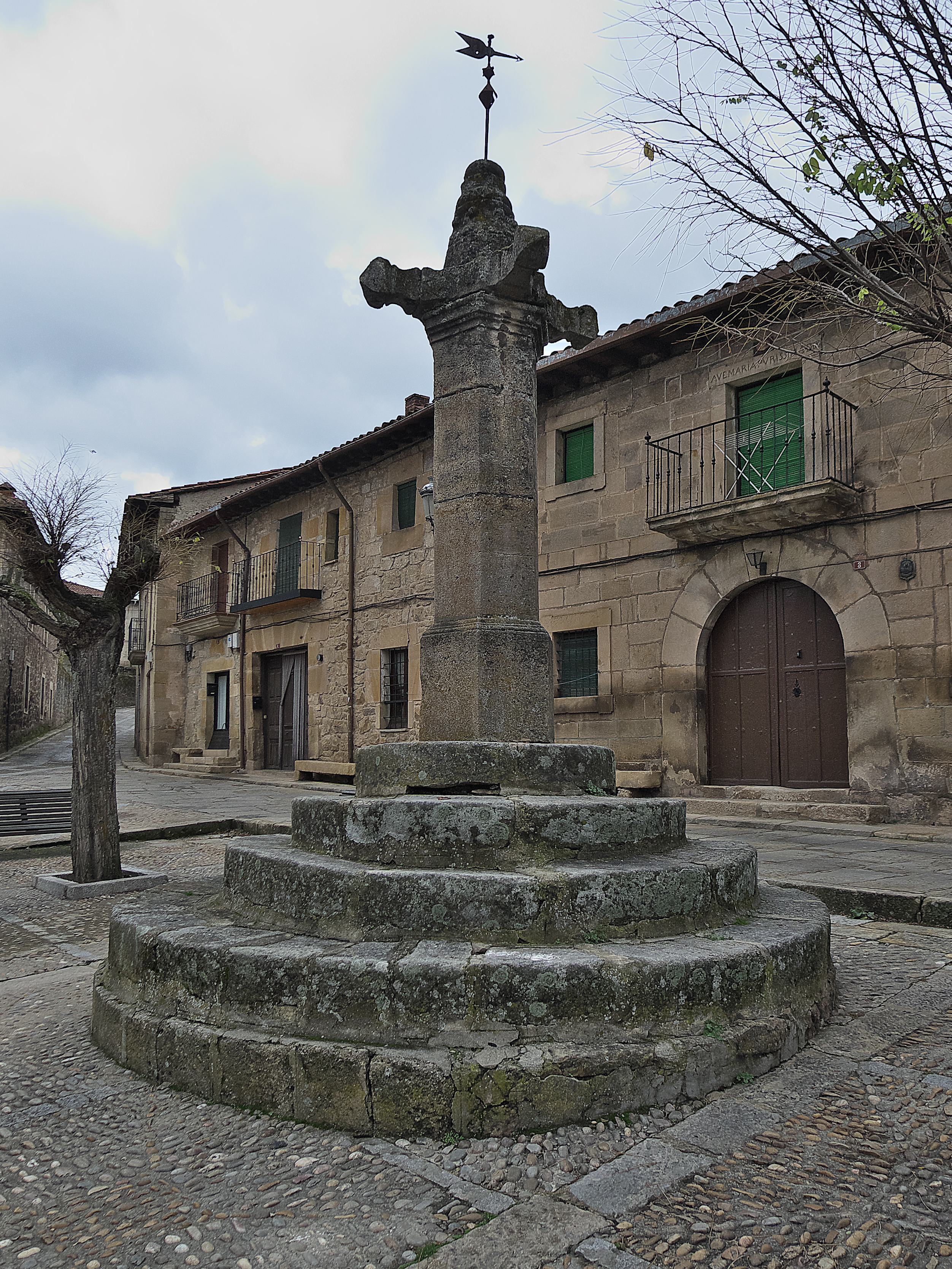 Plaza Plazuela con el Rollo indicativo de la categoría administrativa de Vinuesa, otorgada por Carlos III.